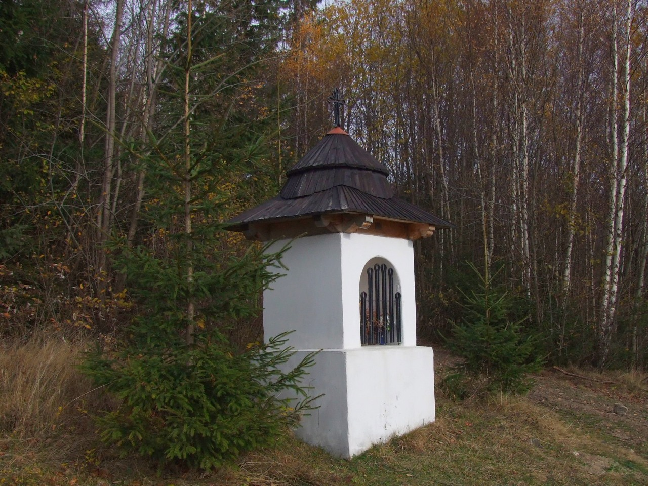 Kapliczka Jasińskich na Zoniowskim (Ochotnica Górna)